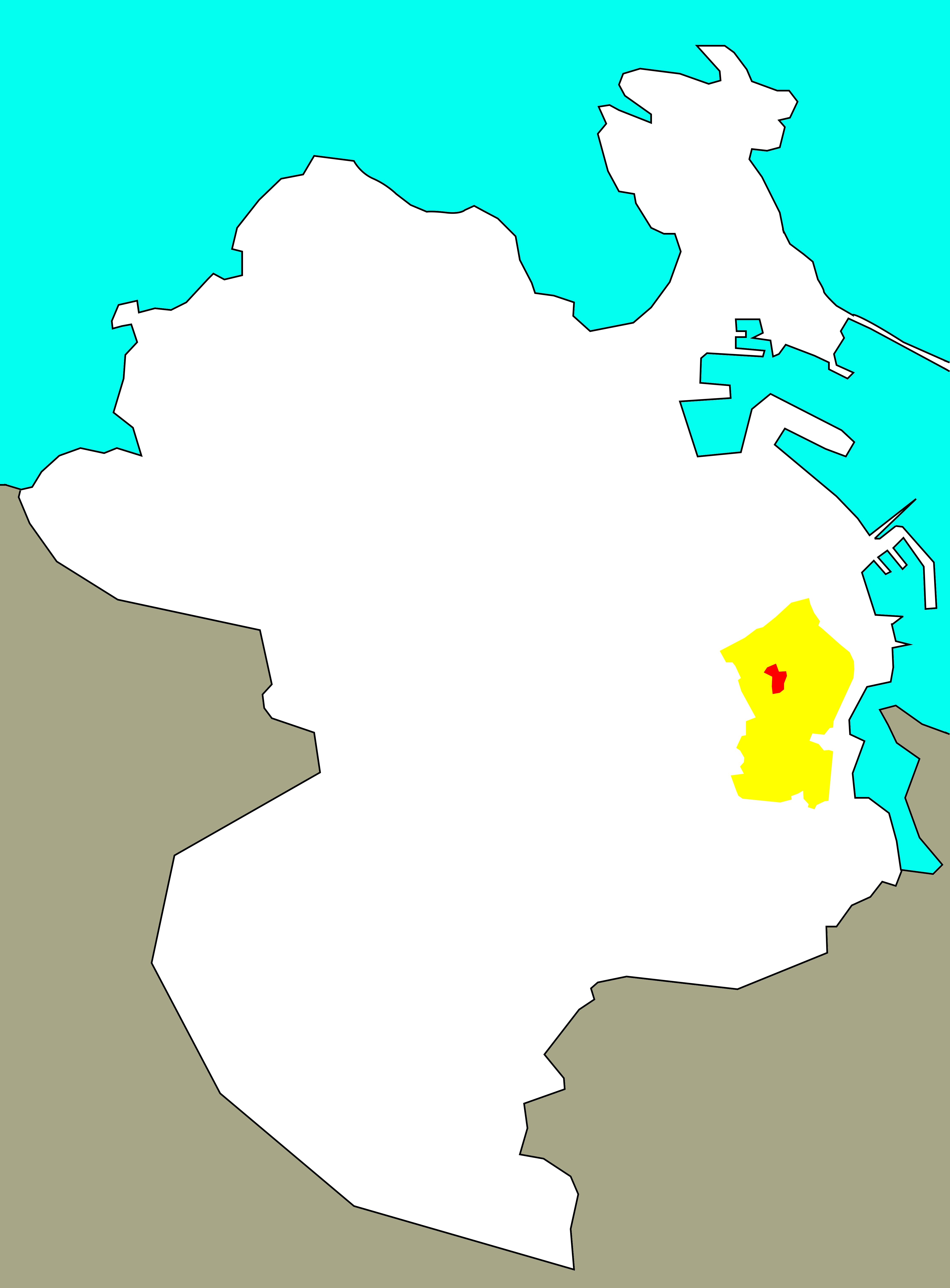 Situación de Casanova de Eirís no "barrio-territorio" de Eirís, segundo